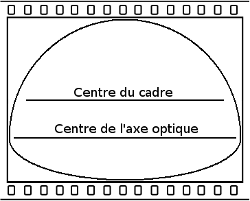 Traduction de l'image de la WP anglophone. (L'auteur ayant placé l'image dans le domaine public, )